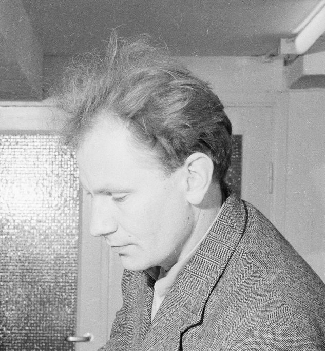 Den norske grafikeren Gunnar S. Gundersen avbildet ved en grafisk presse. Foto: Teigens Fotoatelier/Dextra Photo (1954). Utsnitt av større bilde